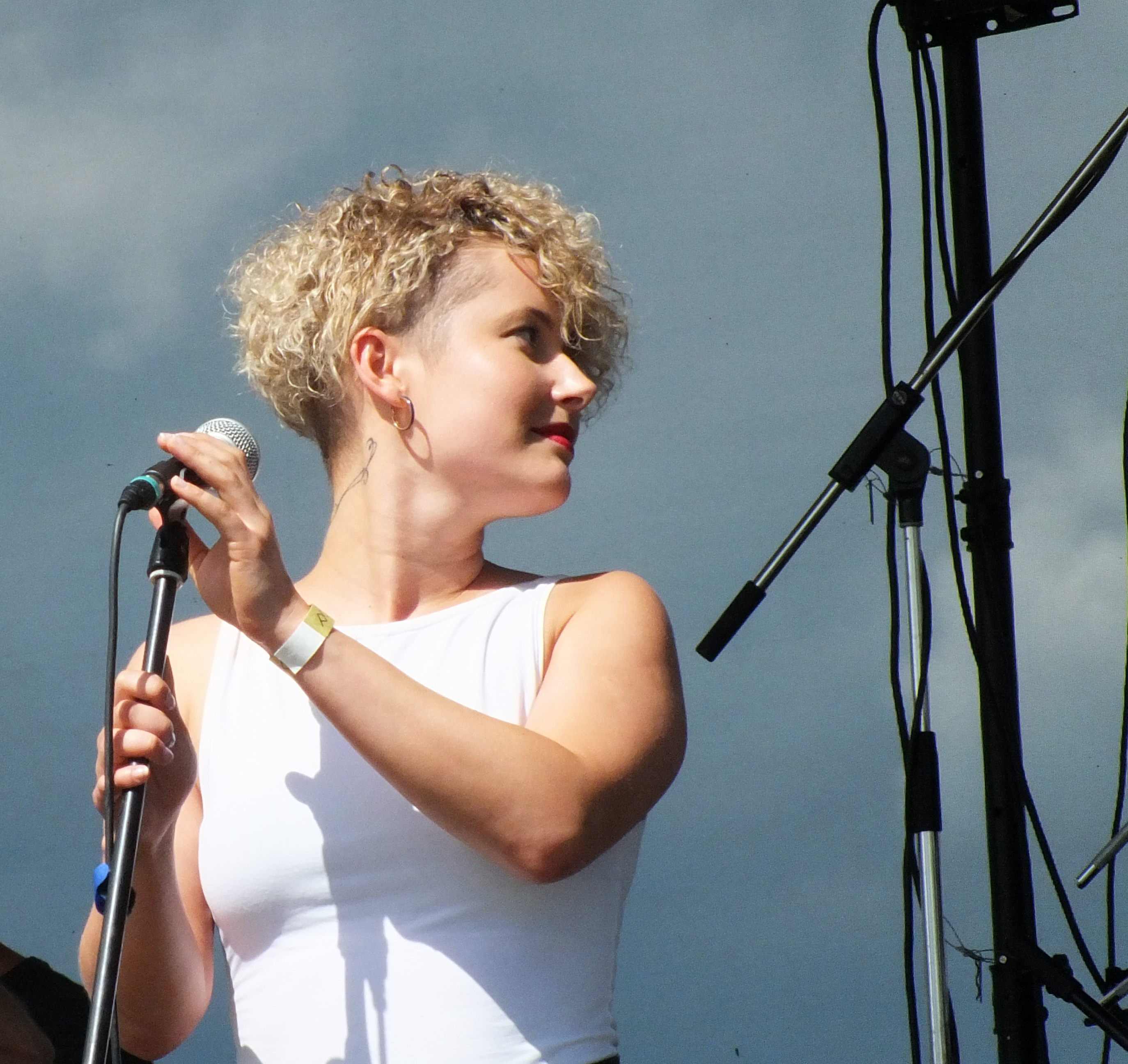 Antra Stafecka koncertā aviācijas svētkos Degumniekos 2017. gadā ar grupu "Otra Puse"